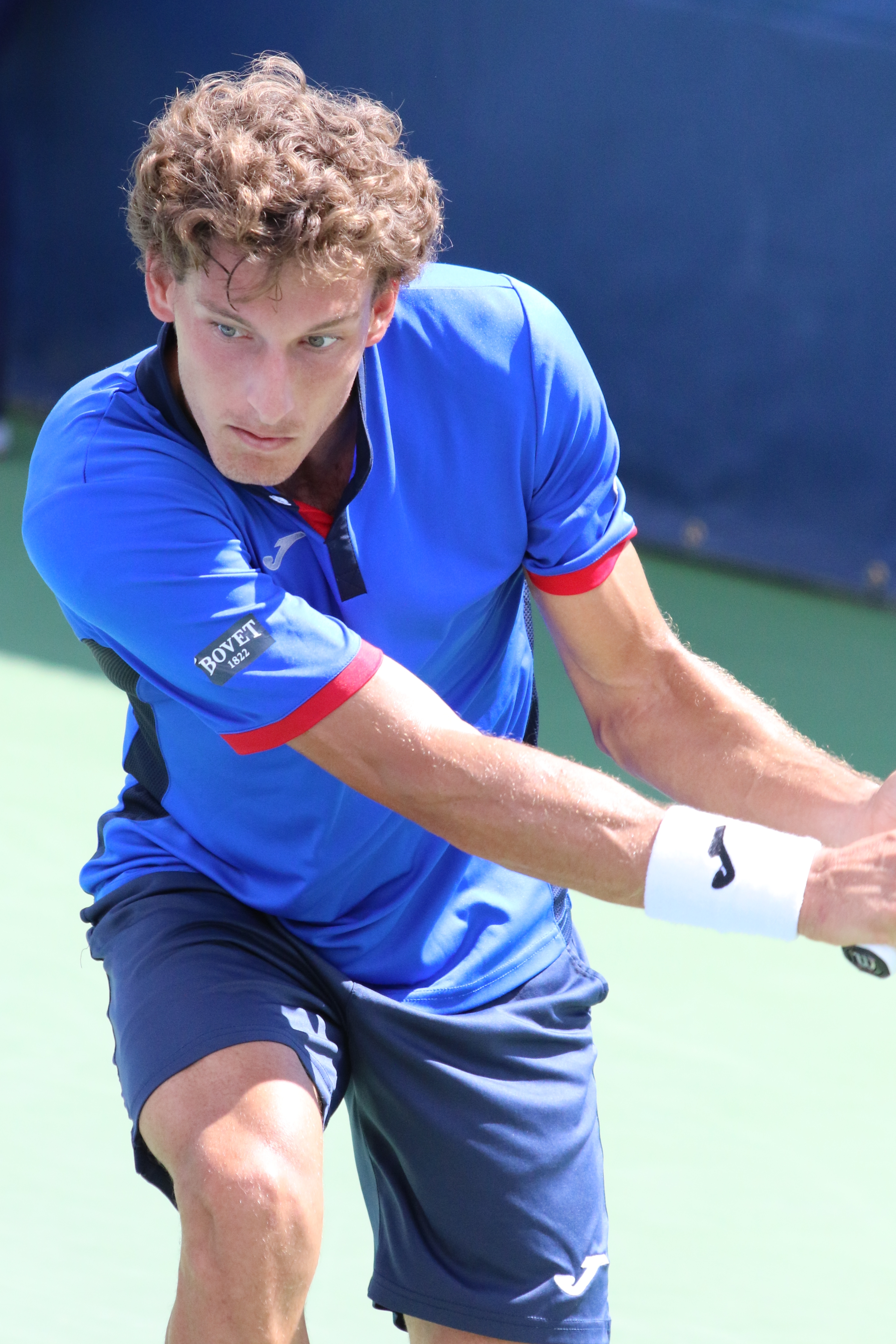 Carreno Busta US16 (28)